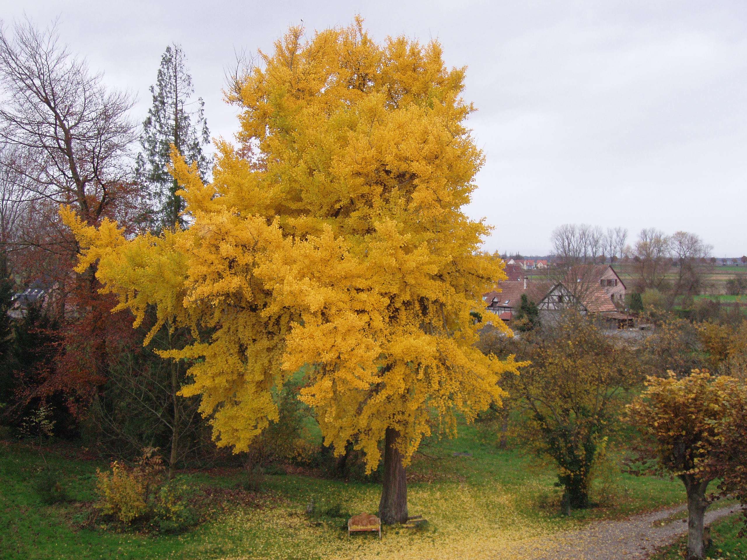 specimen de ginkgo biloba dans le parc du château de werde